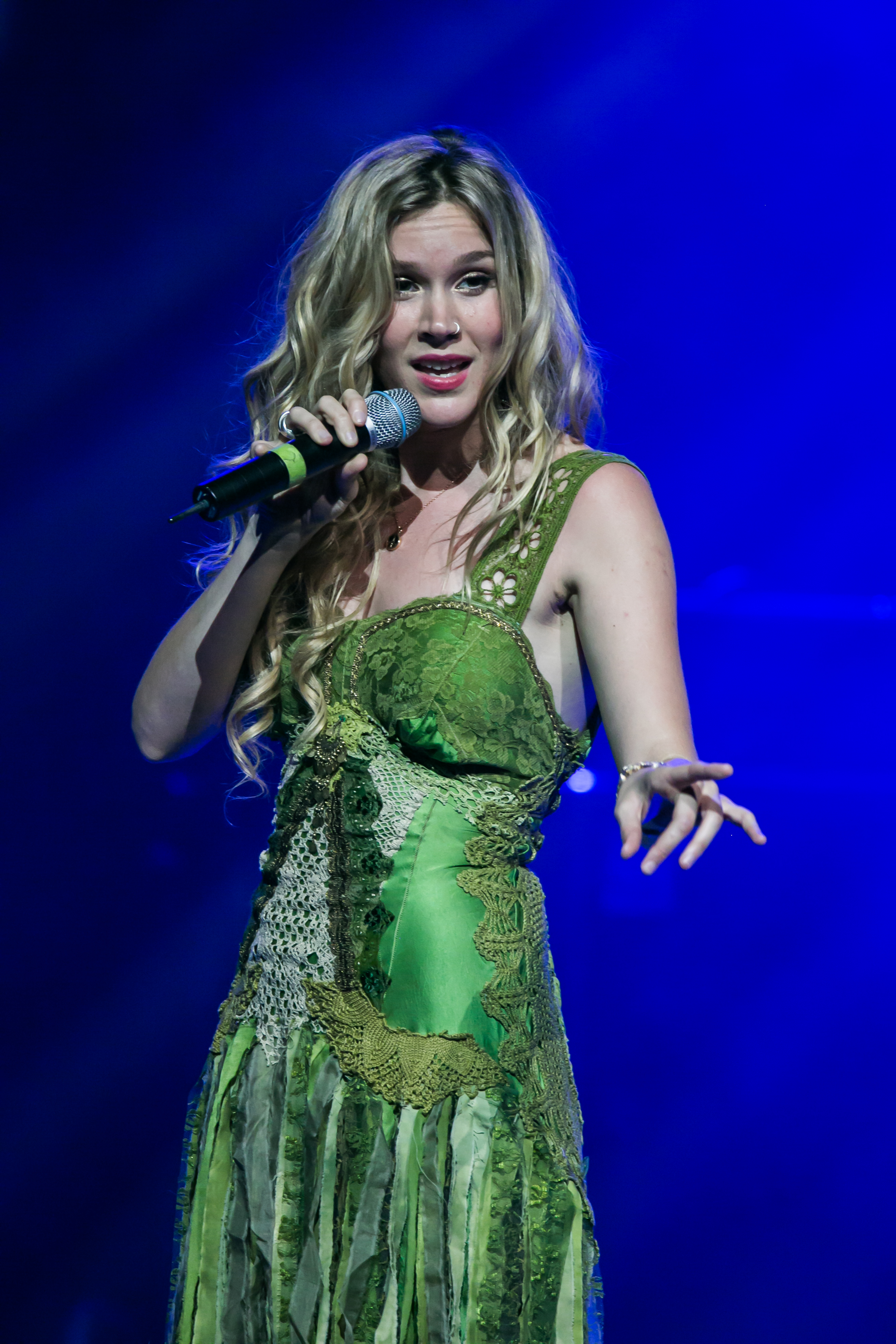 Joss Stone en concierto. Managua, Nicaragua 21 de enero 2016.